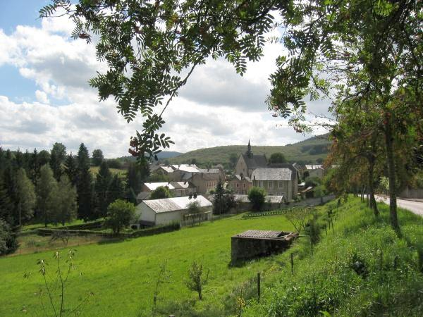 Le bourg de Moux-en-Morvan. Auteur: Syndicat d'Initiative de Moux-en-Morvan